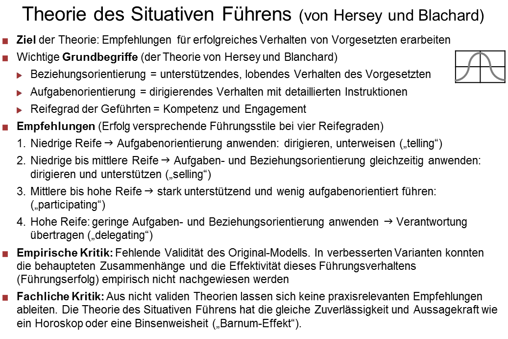 Abbildung 1: Situatives Führen – Management Summary